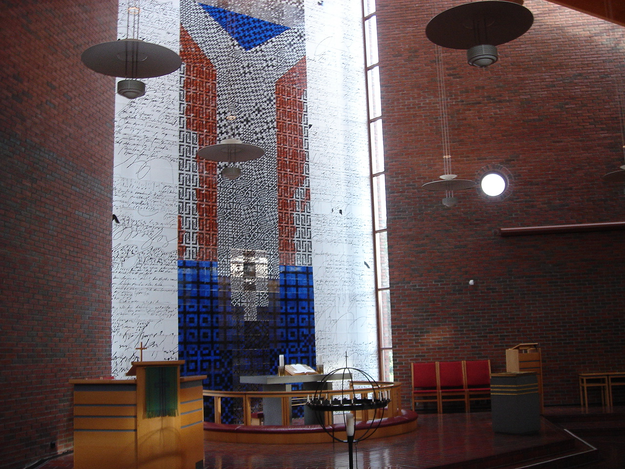 Altar and art in Madlamark Church/Alter og alterbilde i Madlamark kirke